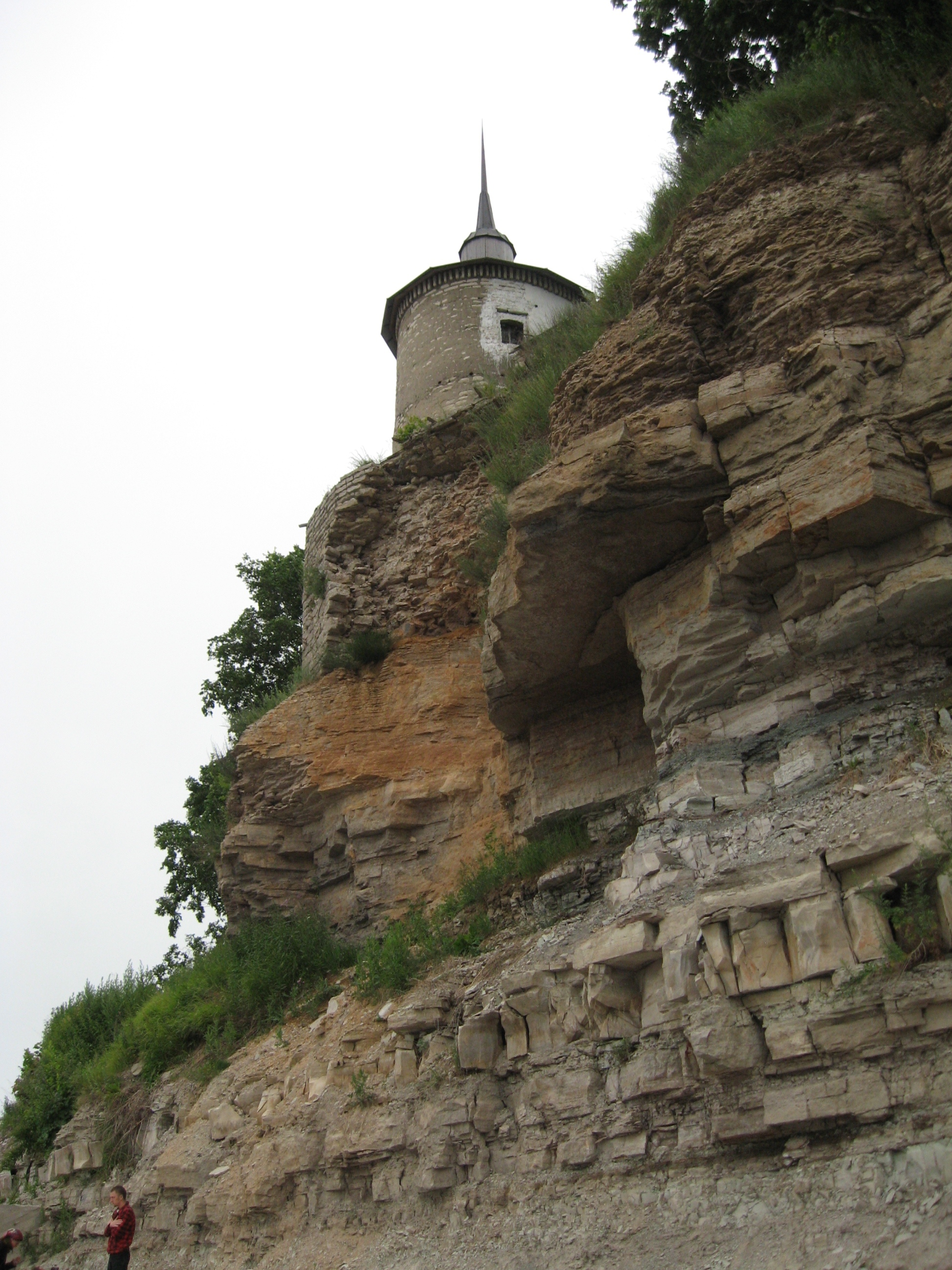 Башня Снетогорского монастыря на обрыве над рекой Великой.